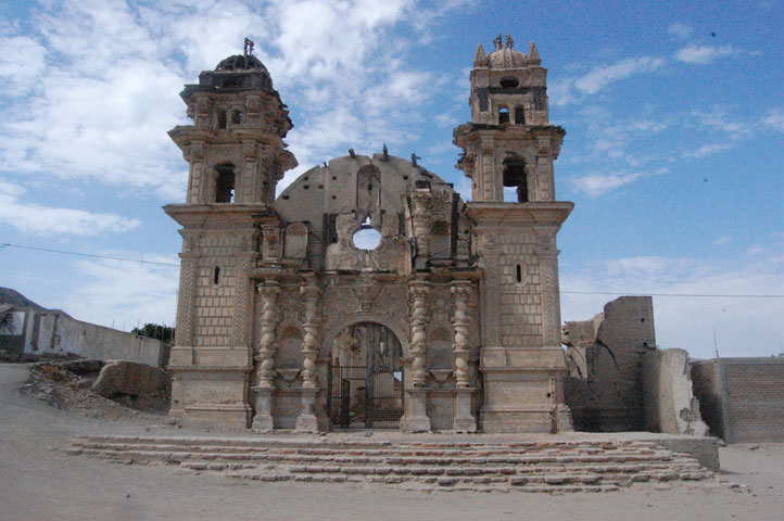 Ruinas de la iglesia de San José en el valle del Ingenio